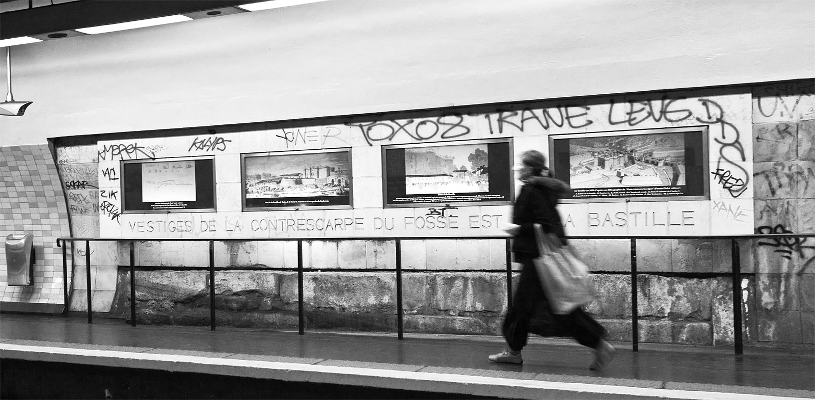 Bastille métro (undergound or subway), ligne 5. Vestiges de la contrescarpe du fossé est de la Bastille